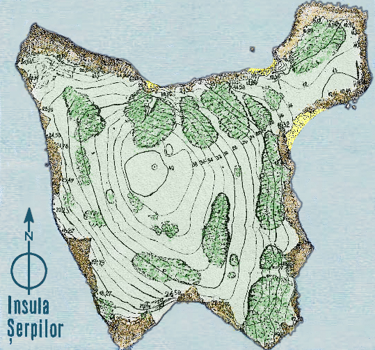 Snake Island